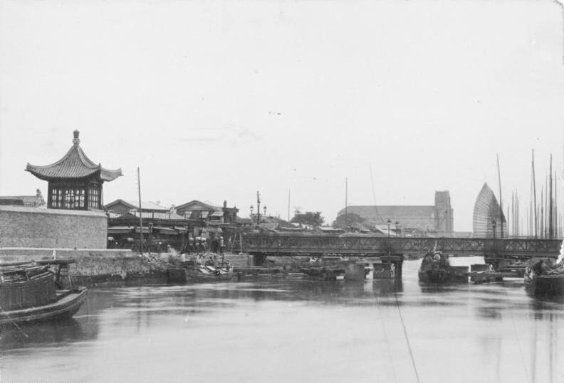 China, Tientsin am Peise (?) Fluß